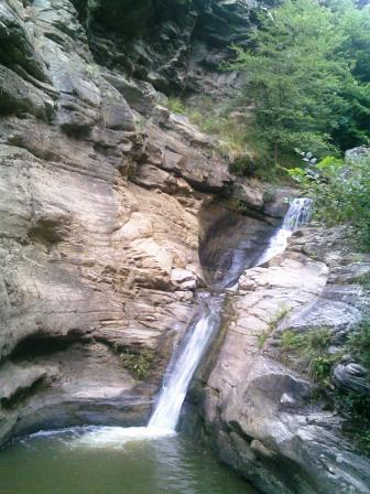 Kazanđol